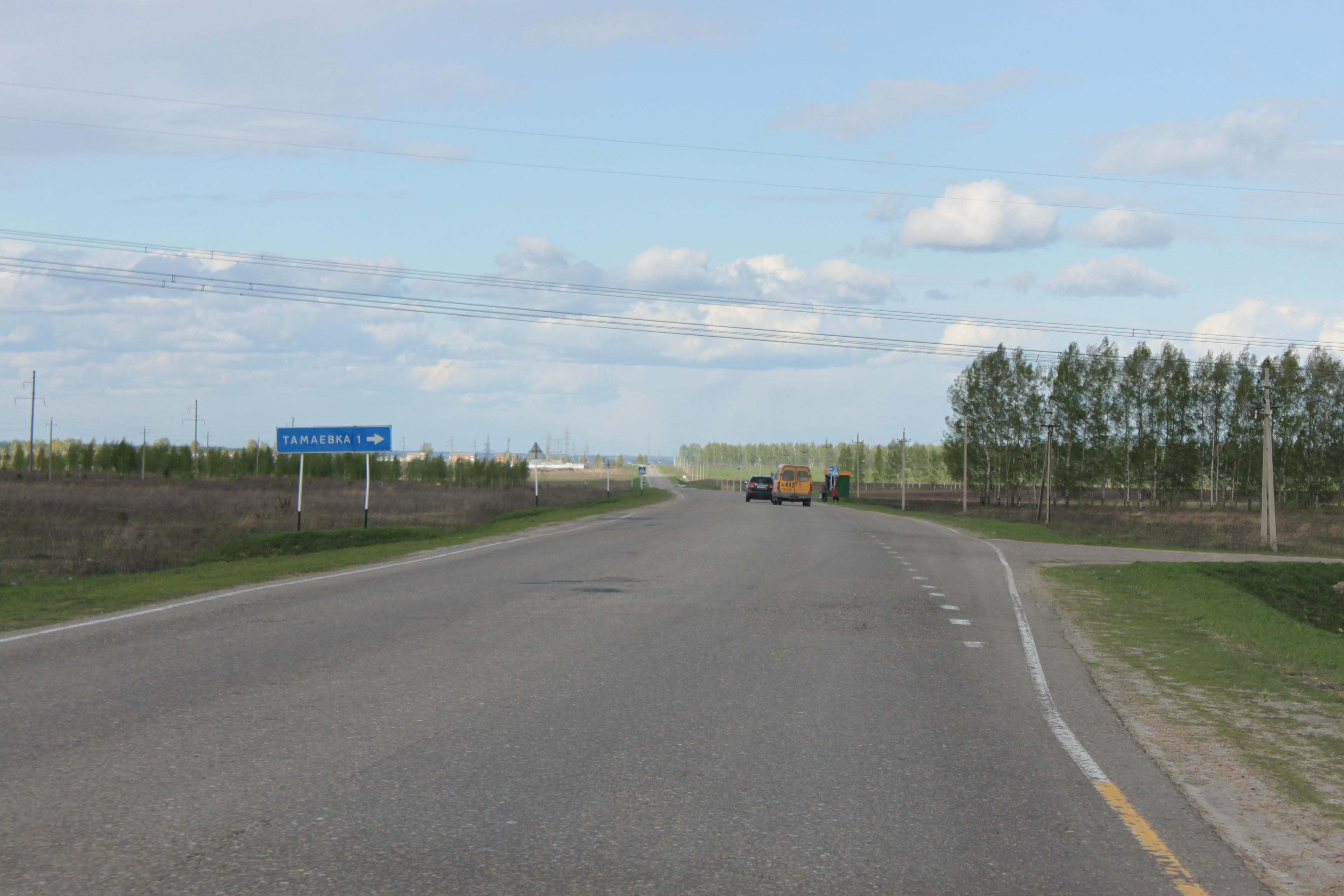 Тамаевка 1 км от трассы Арзамас - Дивеево